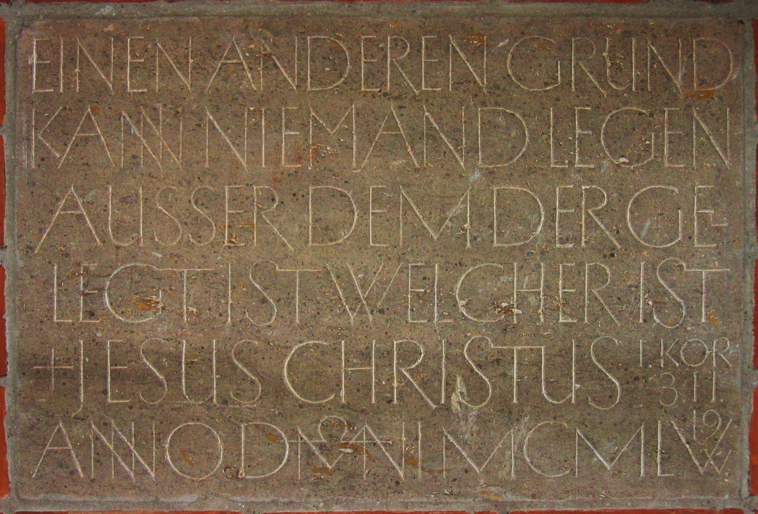 Grundstein der Paul-Gerhardt-Kirche in München.